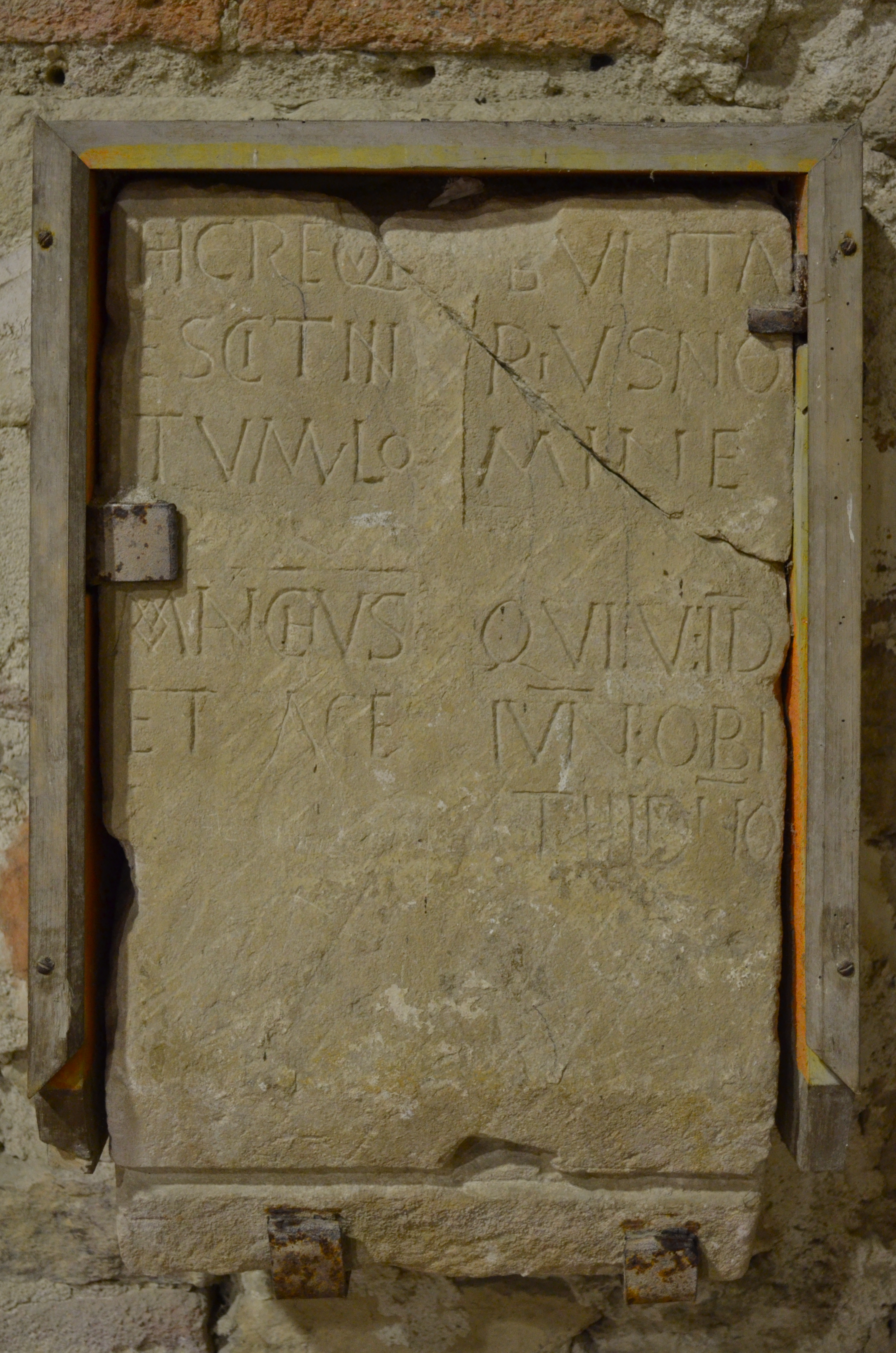 Abbatiale de Saint-Philbert-de-Grand-Lieu (Loire-Atlantique)